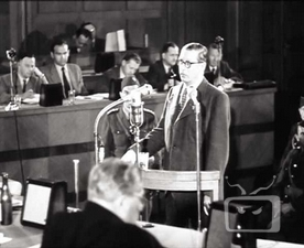 Oldřich Pecl během výslechu při procesu s Miladou Horákovou